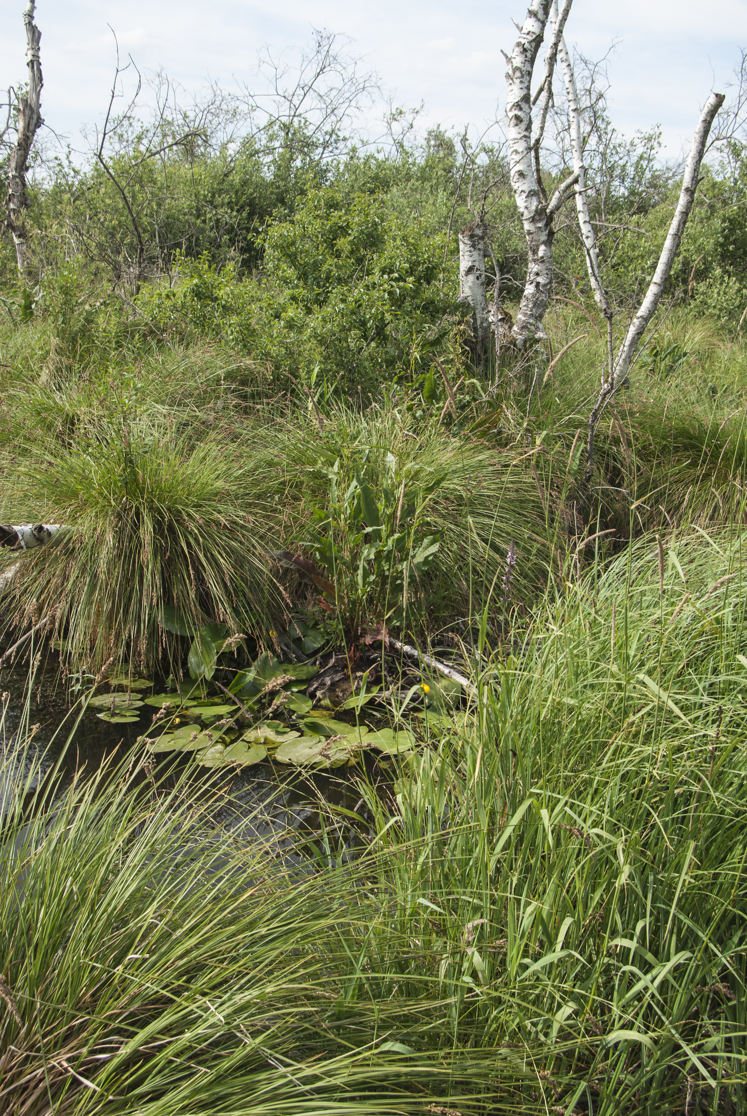 Lebensräume für angepasste Tiere und Pflanzen. Exmoor-Ponys sind ganzjährig im Moos. Die Fraseffekte begünstigen das Vorkommen seltener Pflanzen-,Heuschrecken-,Tagfalter und Vogelarten. Auch wird der pflegerische Effekt von Schafen genutzt. Beobachtungsturm für Vogelbeobachtung.